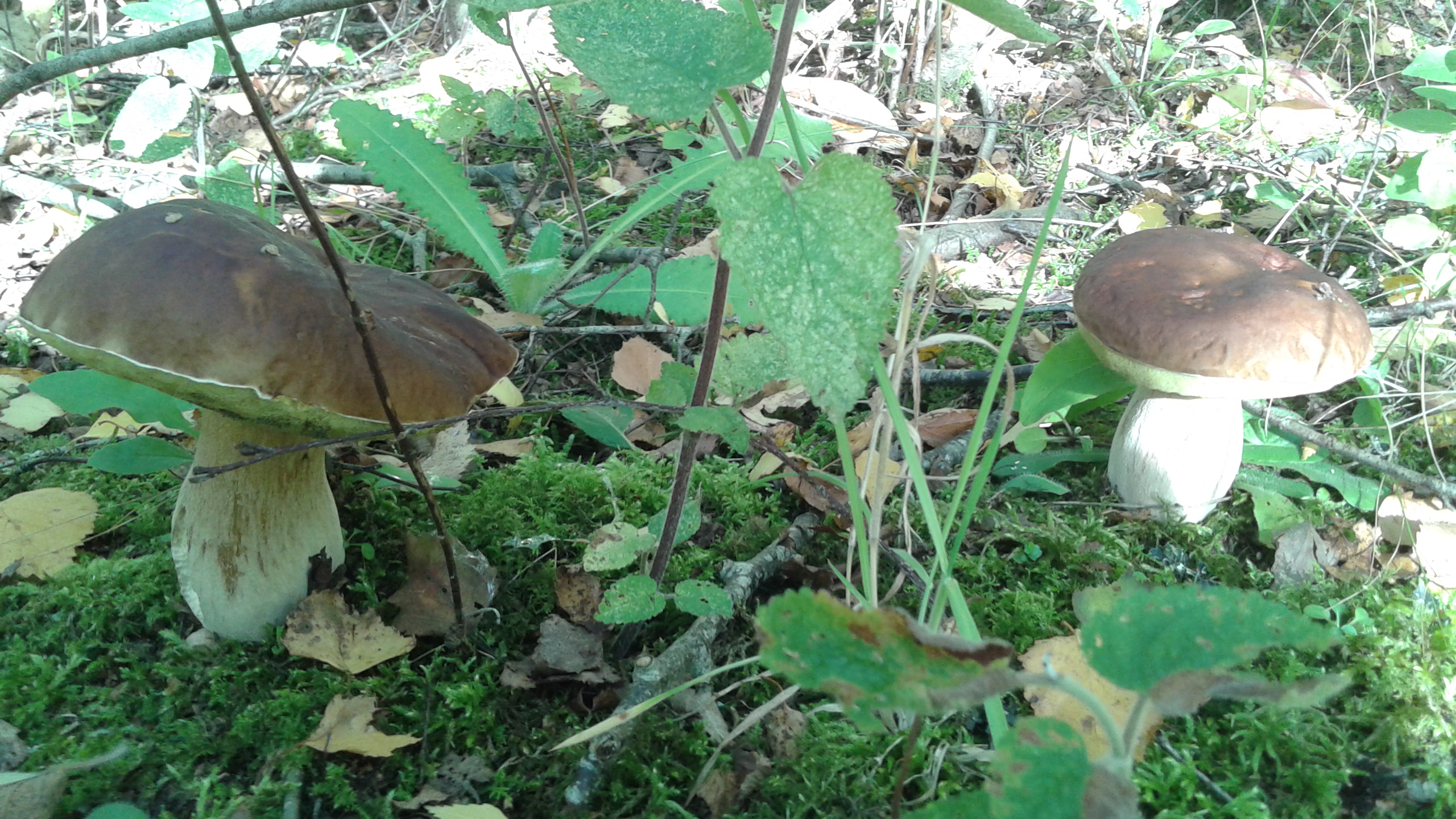 deux cèpes